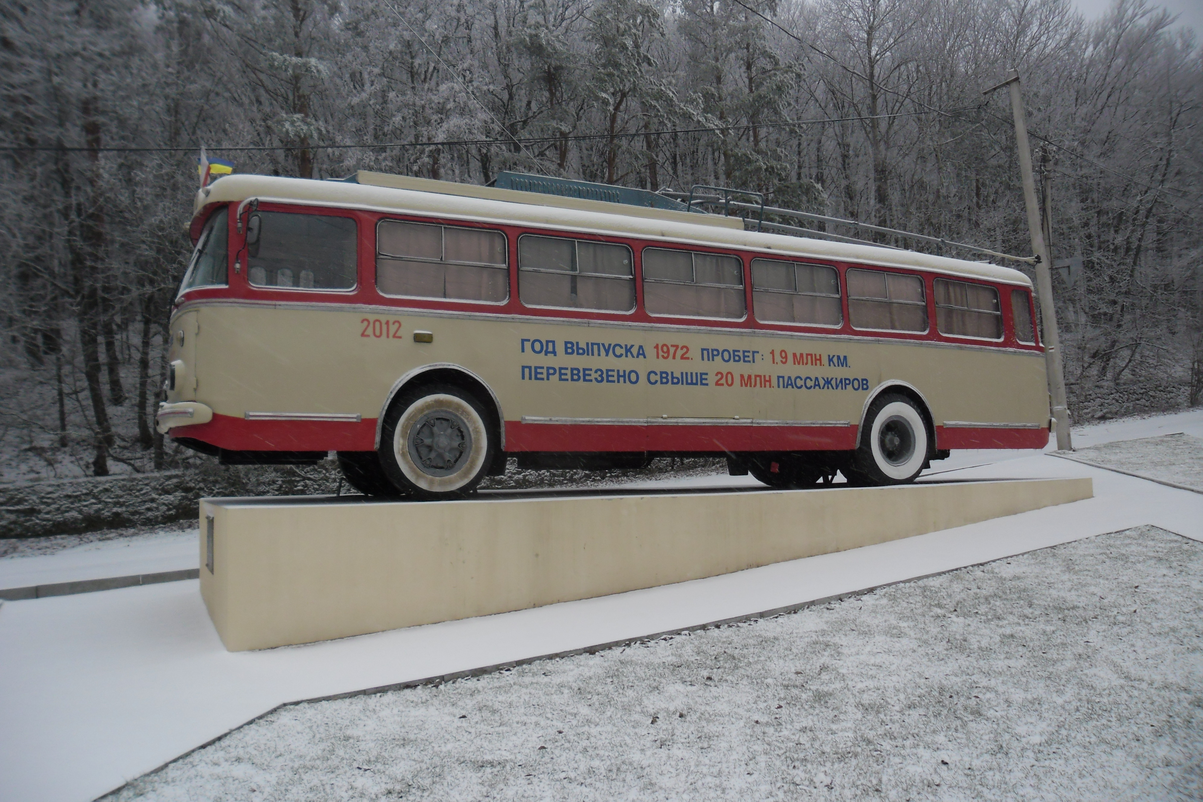 Фото